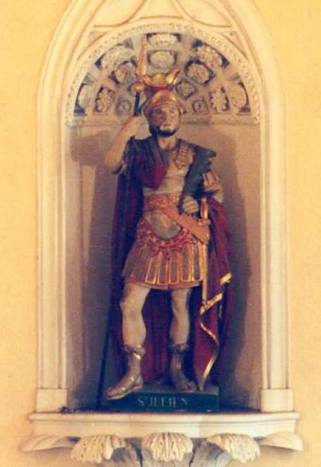 Savas église St Julien soldat